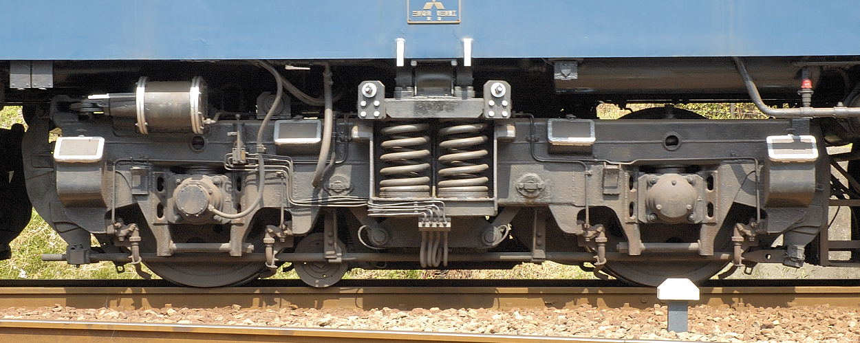 日本国有鉄道（国鉄）→ 東日本旅客鉄道（JR東日本）所属 EF63形電気機関車 (EF63 11) のDT126形台車